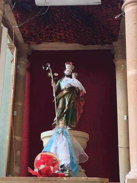 Imagen Religiosa